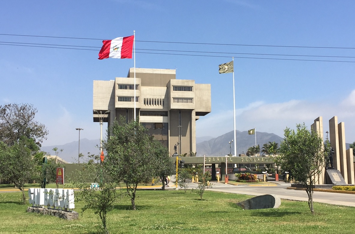 Edificio central del Cuartel General del Ejército del Perú (San Borja)